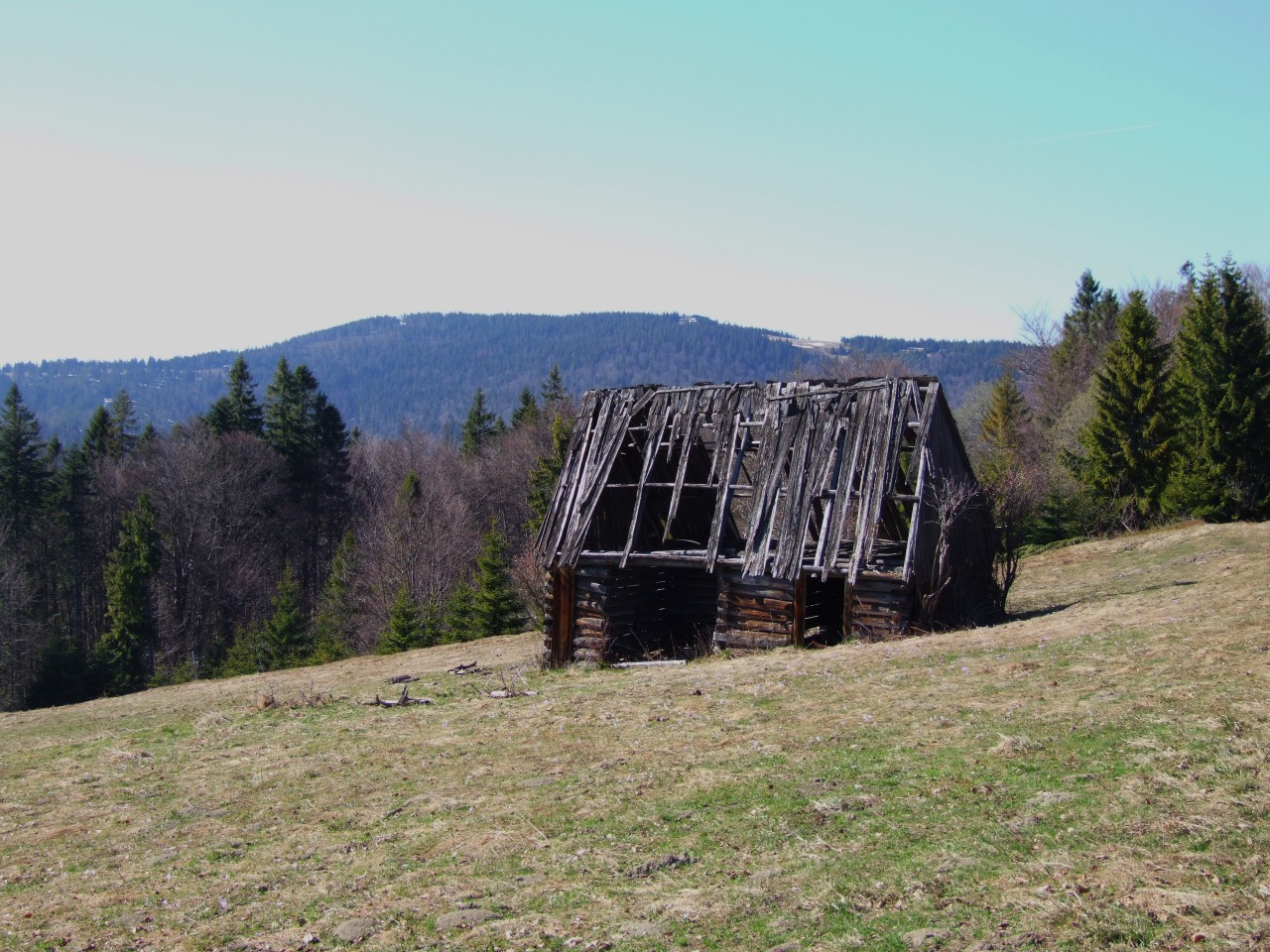 Polana Jankówki w Gorcach. Niszczejacy szałas i widok na Turbacz